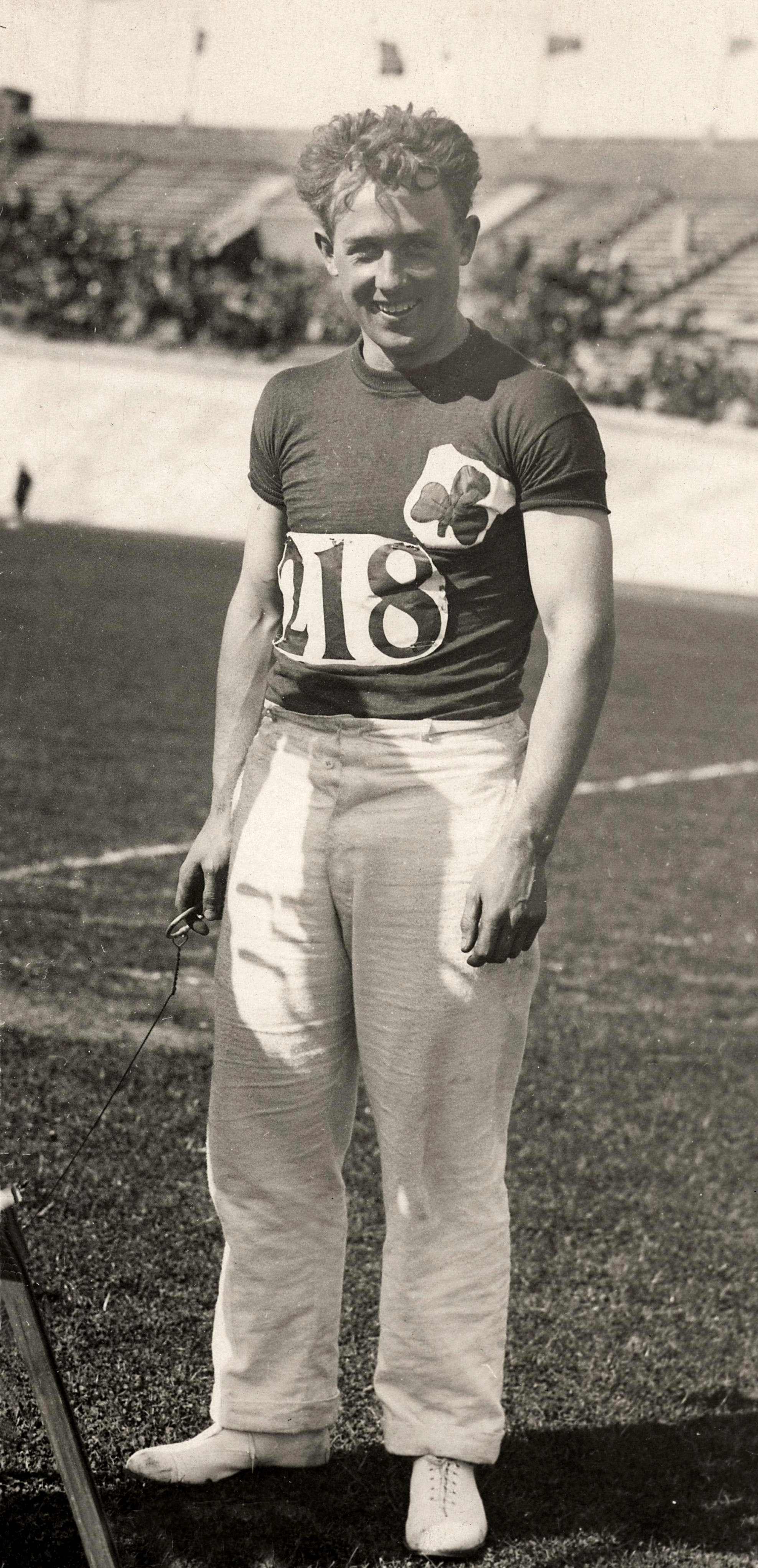 Sport, Olympische Spelen Amsterdam, 1928 : Olympisch kampioen kogelslingeren Patrick O'Callaghan uit Ierland.